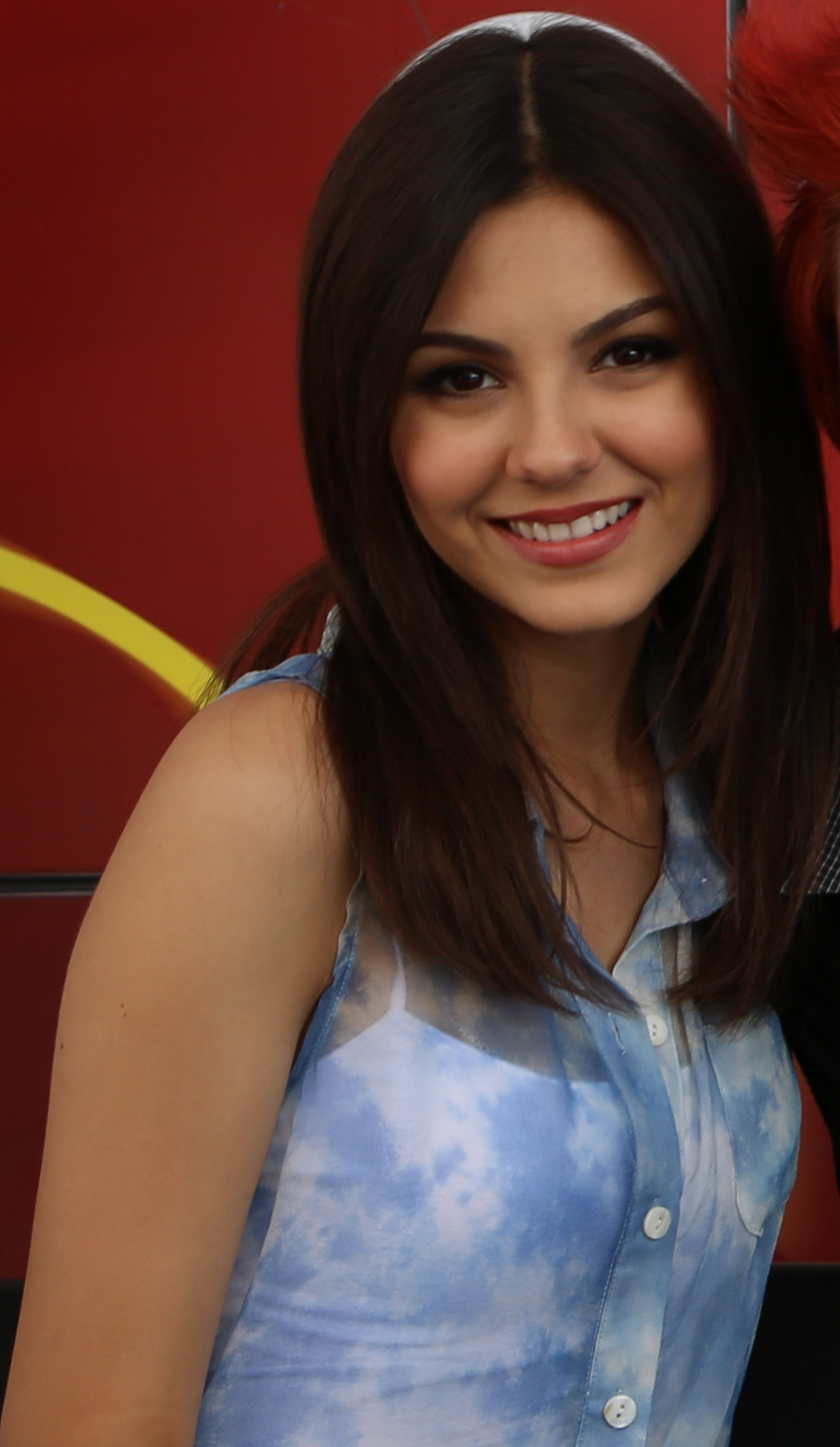 0O3A0511